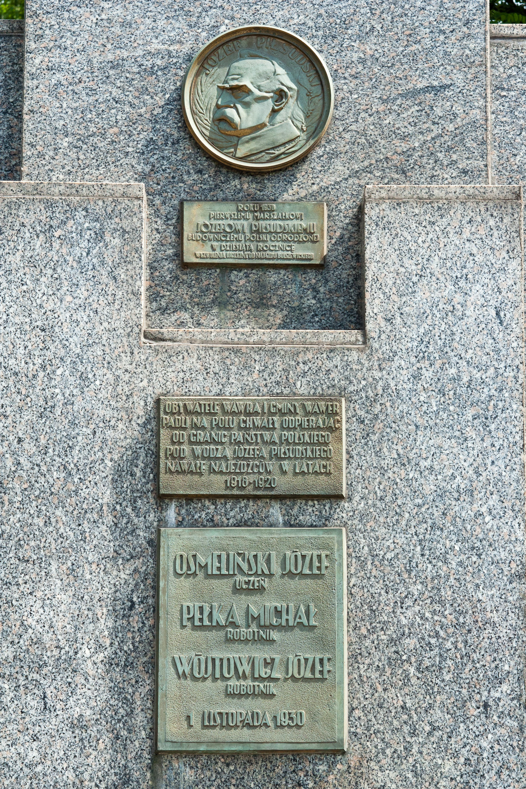 Pomnik poświęcony pamięci Józefa Piłsudskiego oraz poległych w obronie ojczyzny w latach 1918-1920 - tablice. Pomnik usytuowany jest przed budynkiem dawnej "Murowanki". Napisy: Wokół profilu Piłsudskiego: JÓZEF PIŁSUDSKI Najwyższa tablica ROK 1930 PIERWSZEMU MARSZAŁKOWI JÓZEFOWI PIŁSUDSKIEMU BUDOWNICZEMU POLSKI ODRODZONEJ W DZIESIĄTĄ ROCZNICĘ WYZWOLENIA OJCZYZNY OD NAJAZDU BOLSZEWICKIEGO Środkowa tablica: OBYWATELE WAWRA I GMINY WAWER PADLI NA POLU CHWAŁY ODPIERAJĄC OD GRANIC PAŃSTWA POLSKIEGO POD WODZĄ JÓZEFA PIŁSUDSKIEGO NAWAŁĘ NAJEŹDŹCÓW W LATACH 1918-1920 Dolna tablica: OSMELIŃSKI JÓZEF UCZEŃ PEŁKA MICHAŁ ROBOTNIK WÓJTOWICZ JÓZEF ROBOTNIK 1 LISTOPADA 1930 Lokalizacja: okolica ul.Płowiecka 77 w Warszawie (w Wawrze)